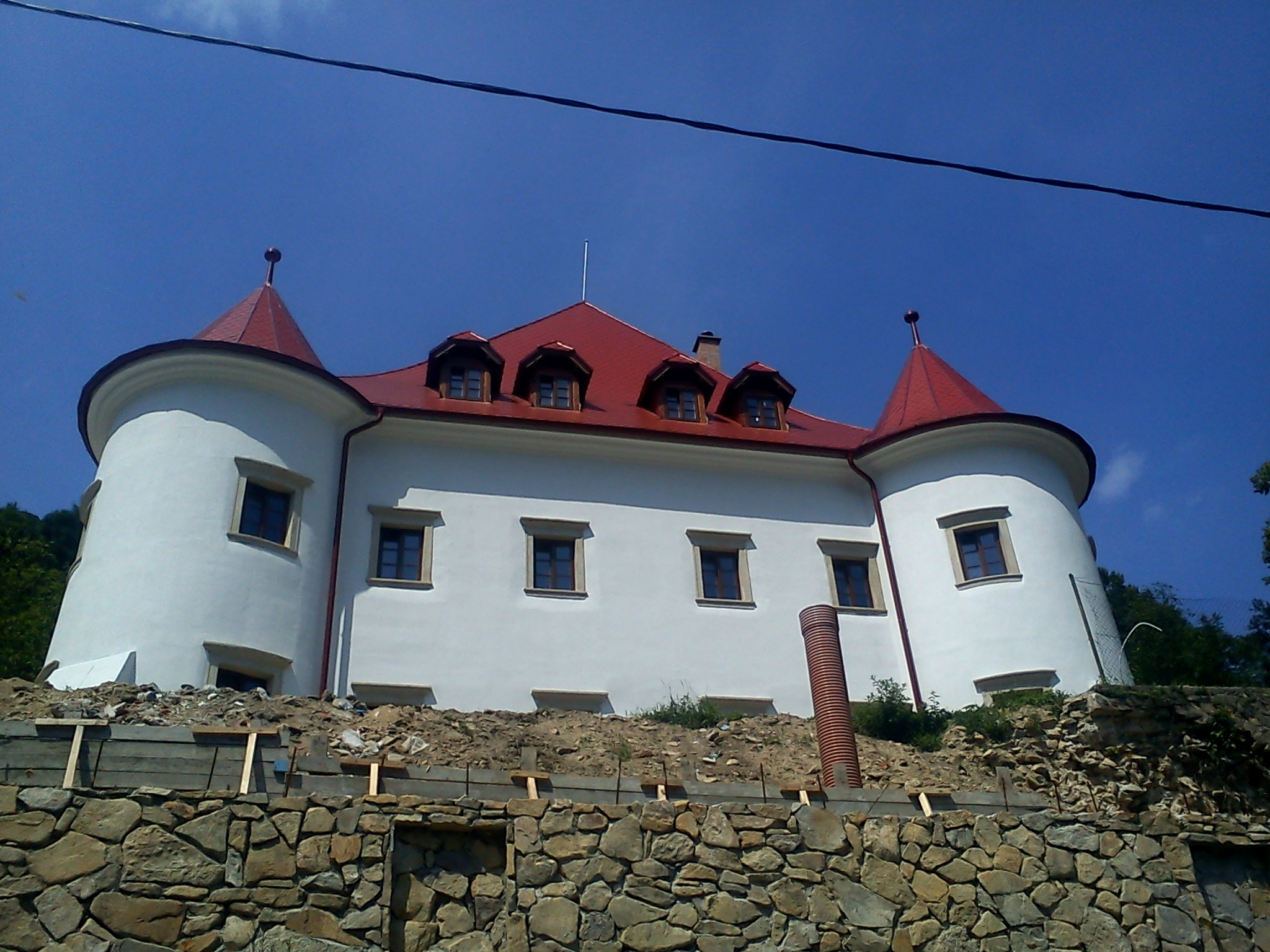 Kaštiel pod Považským hradom